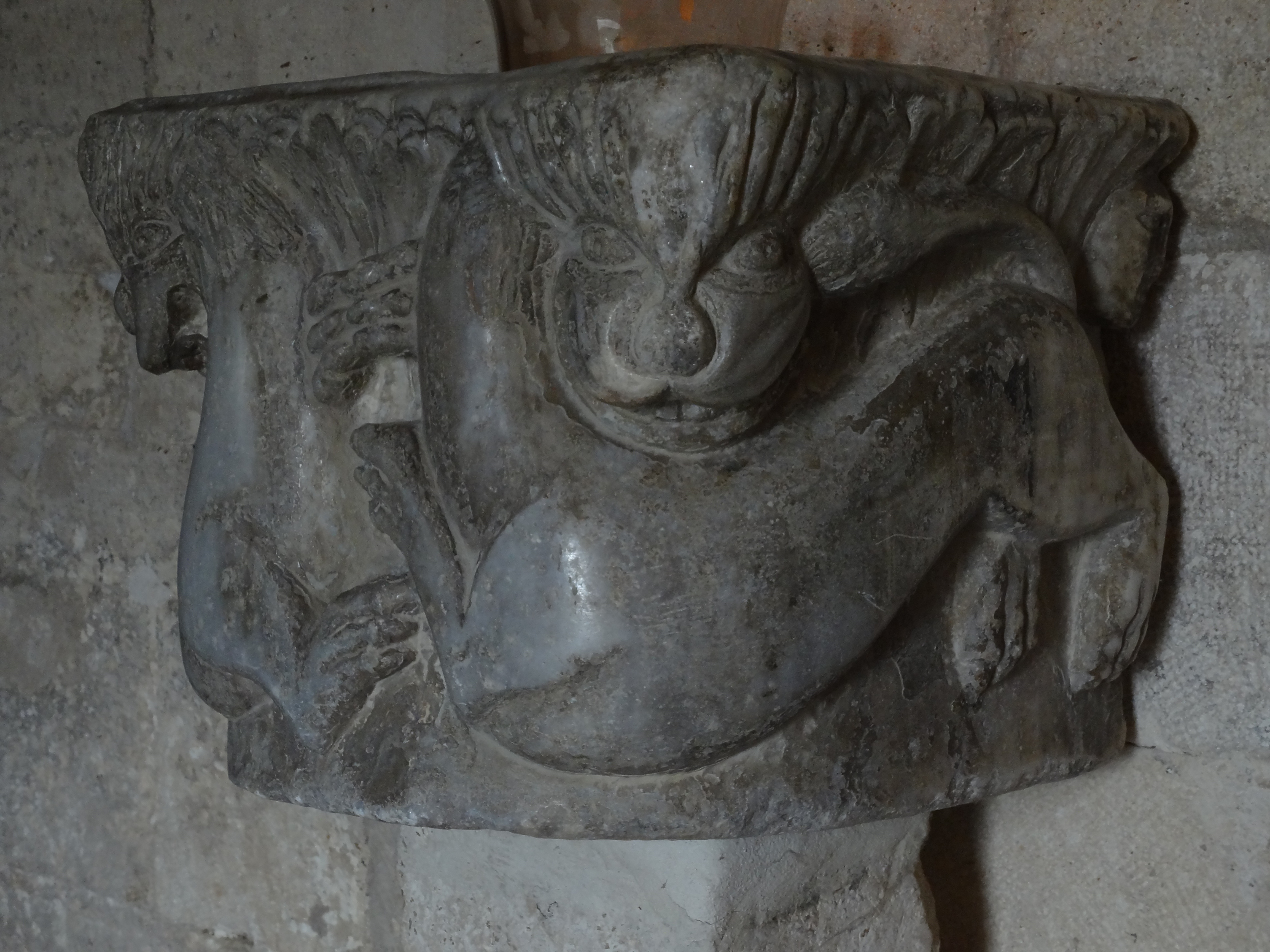 Le bénitier est creusé dans un chapiteau : décor animalier. Classé au titre objet.